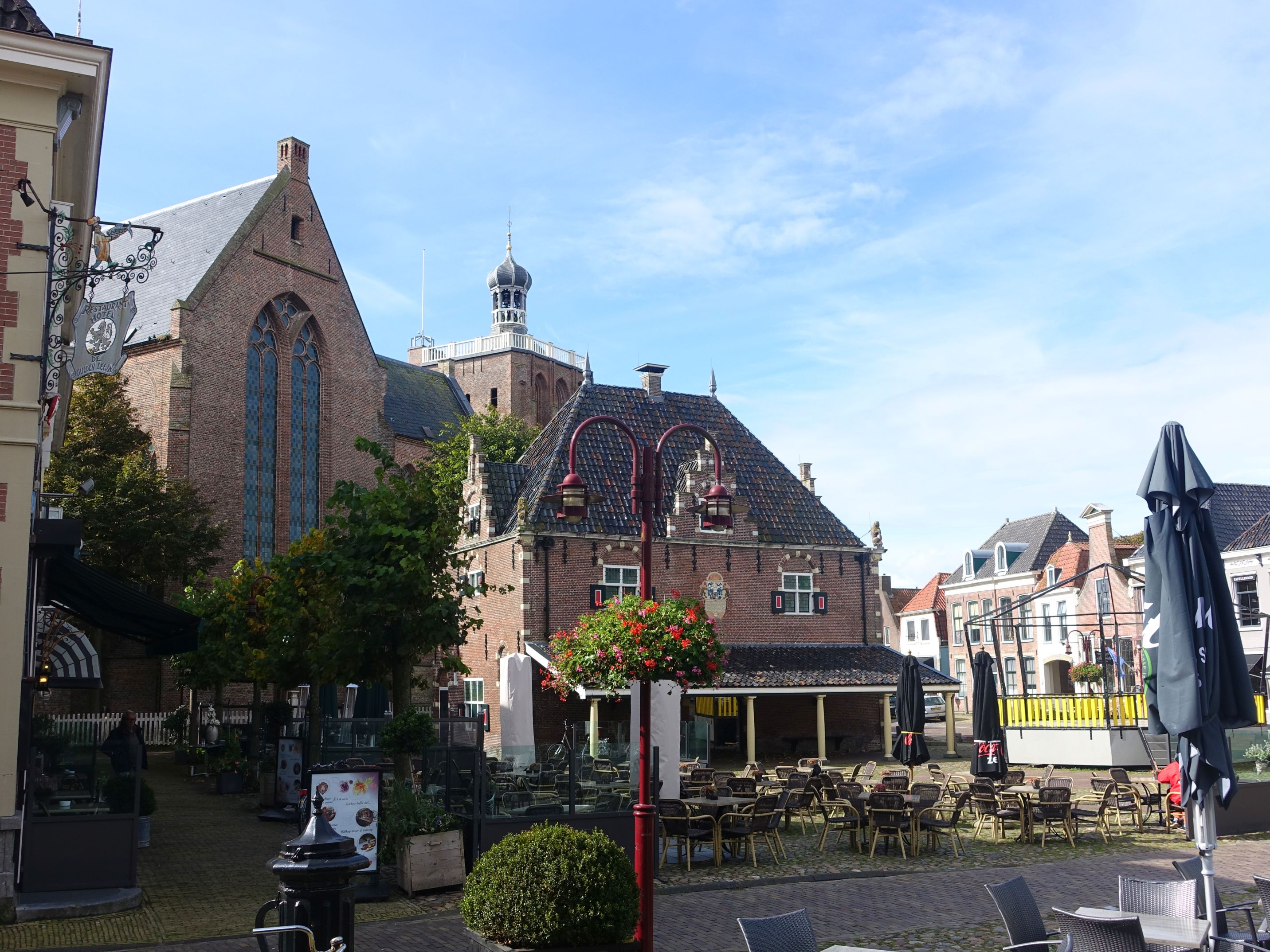 Markt in Workum